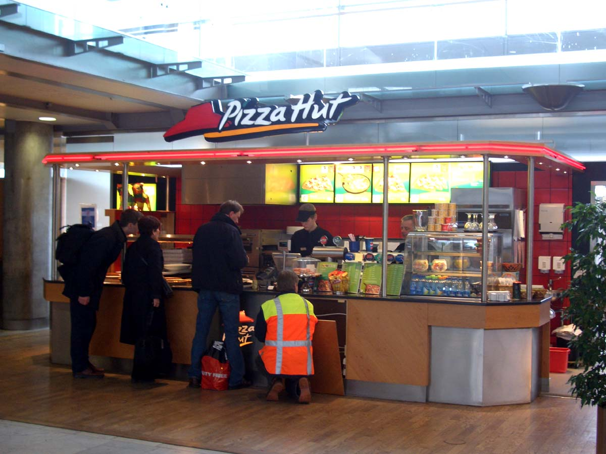 Un restaurant Pizza Hut à l'aéroport d'Oslo